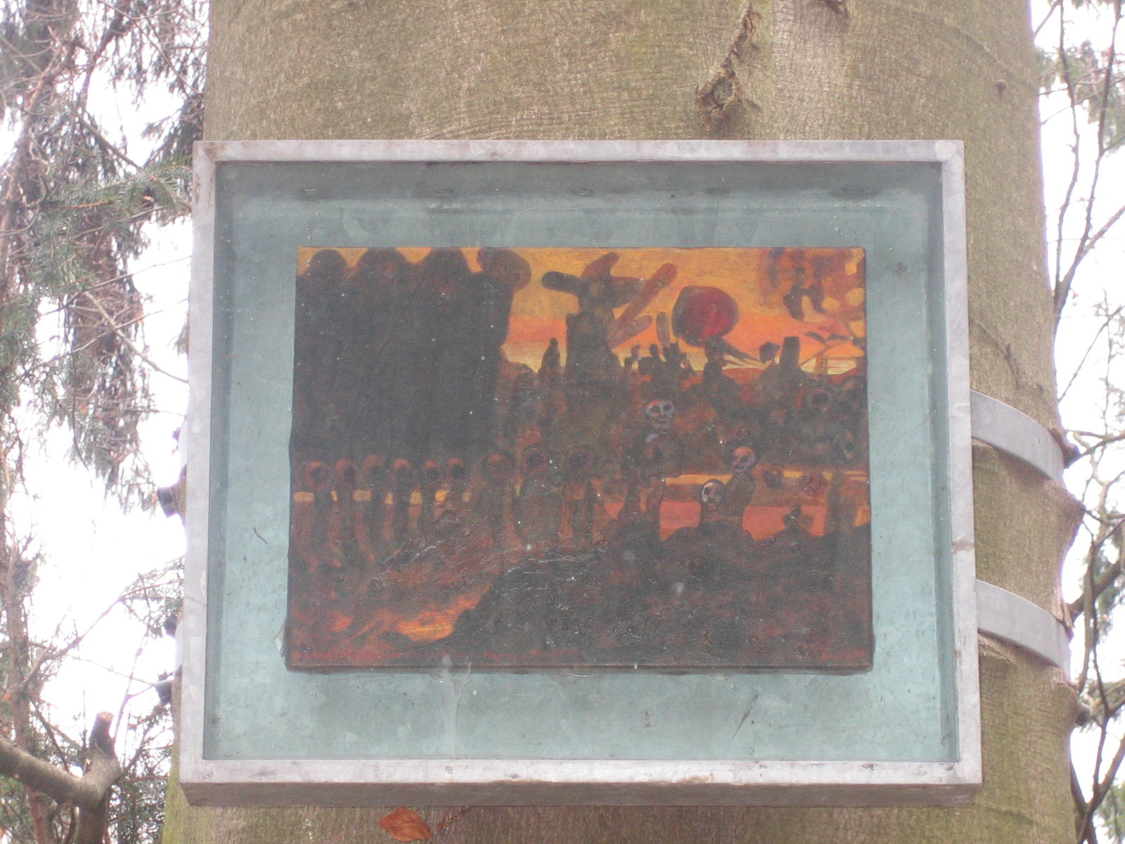 Blalla W. Hallmann, Grab in einem öffentlichem Friedhof